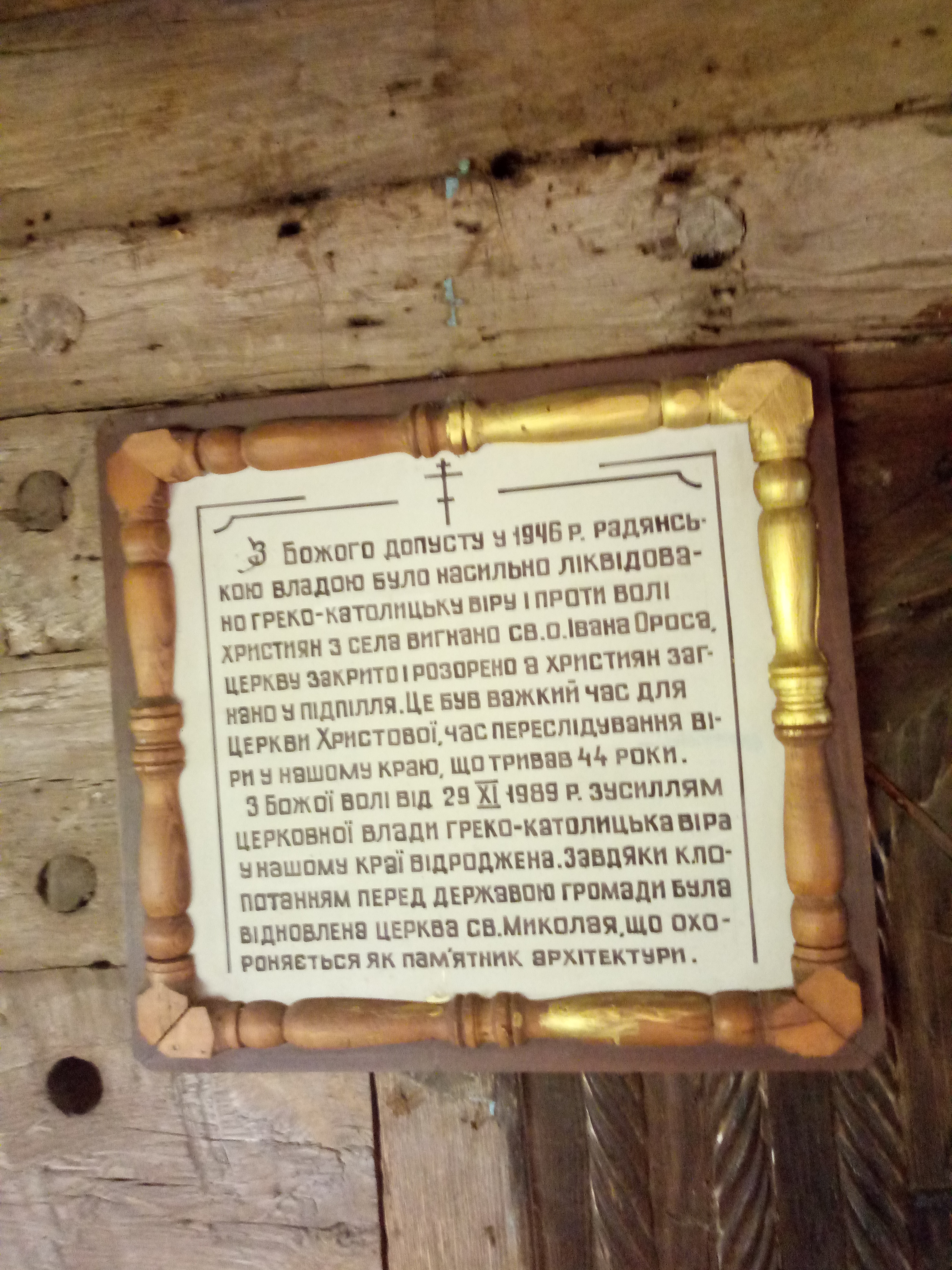 фотографія